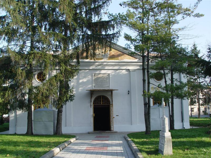 Foto: Jose Goncalves